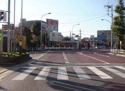 国道20号と旧甲州街道が合流する本宿町交差点。